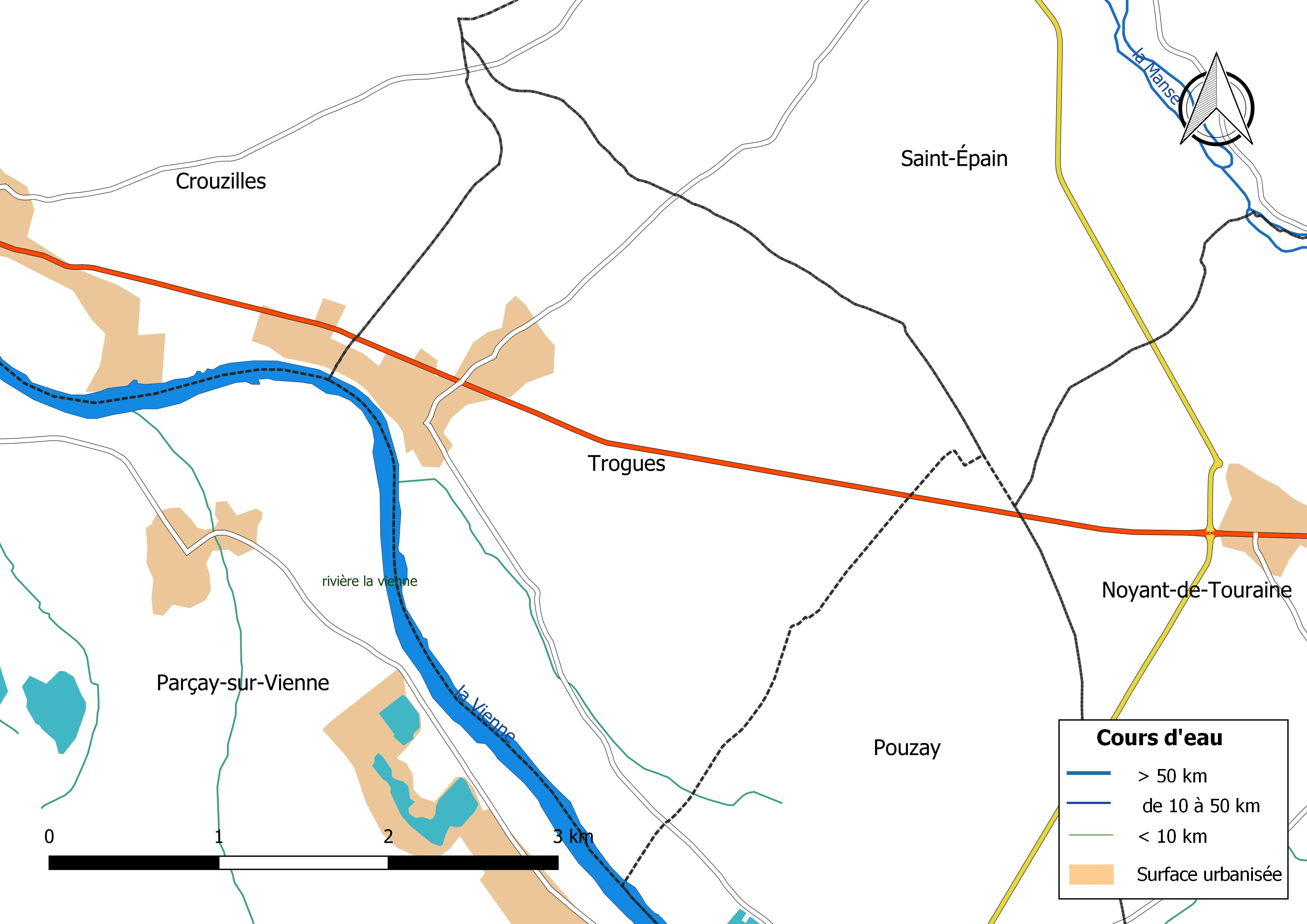 Carte du réseau hydrographique de la commune de Trogues (France).